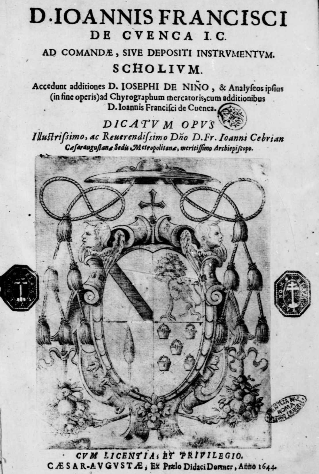 Frontespizio